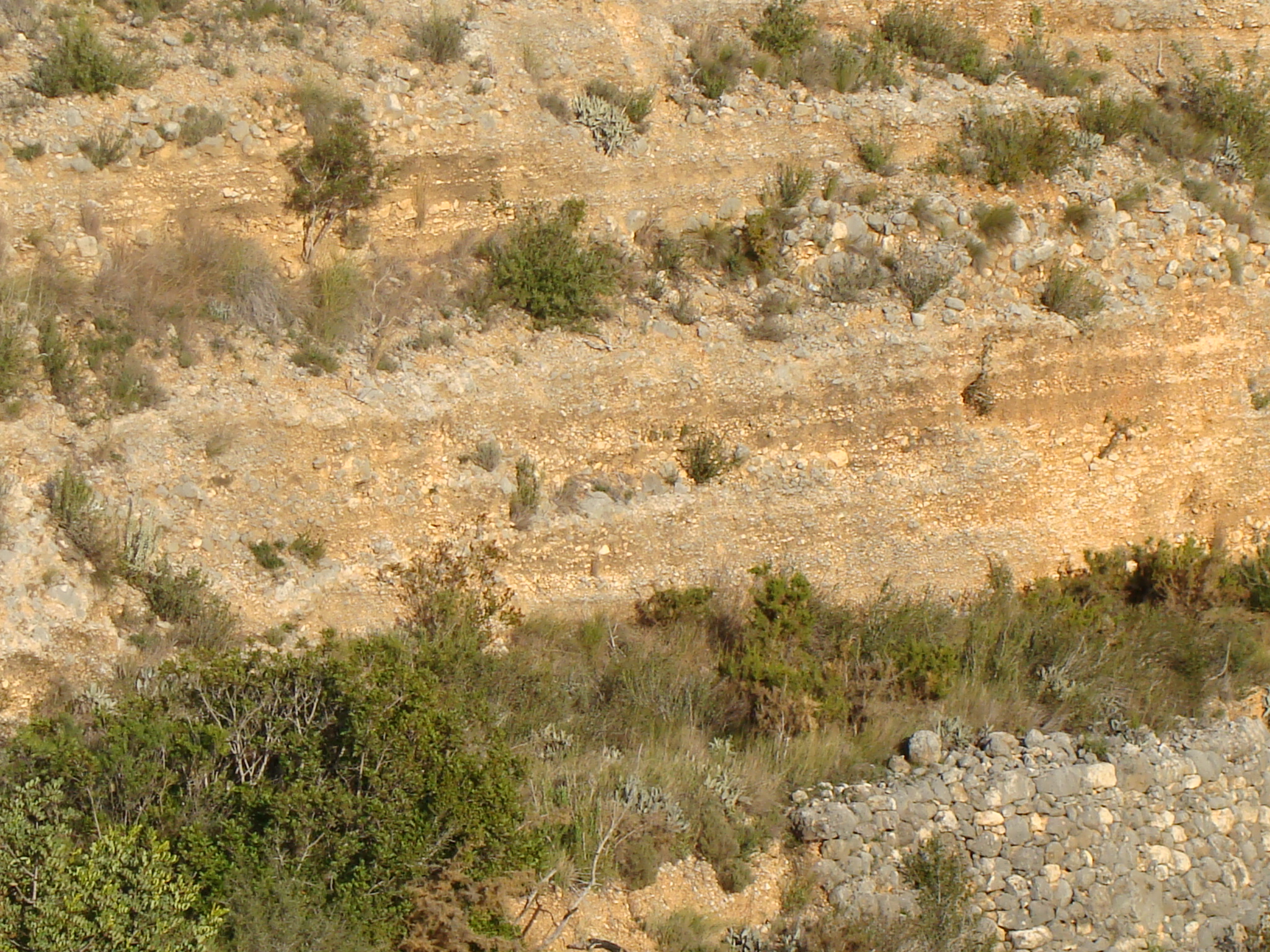 Los colores distintos nos dan la clave para hablar de la composición de la zona desde el punto de vista mineralógico de la zona